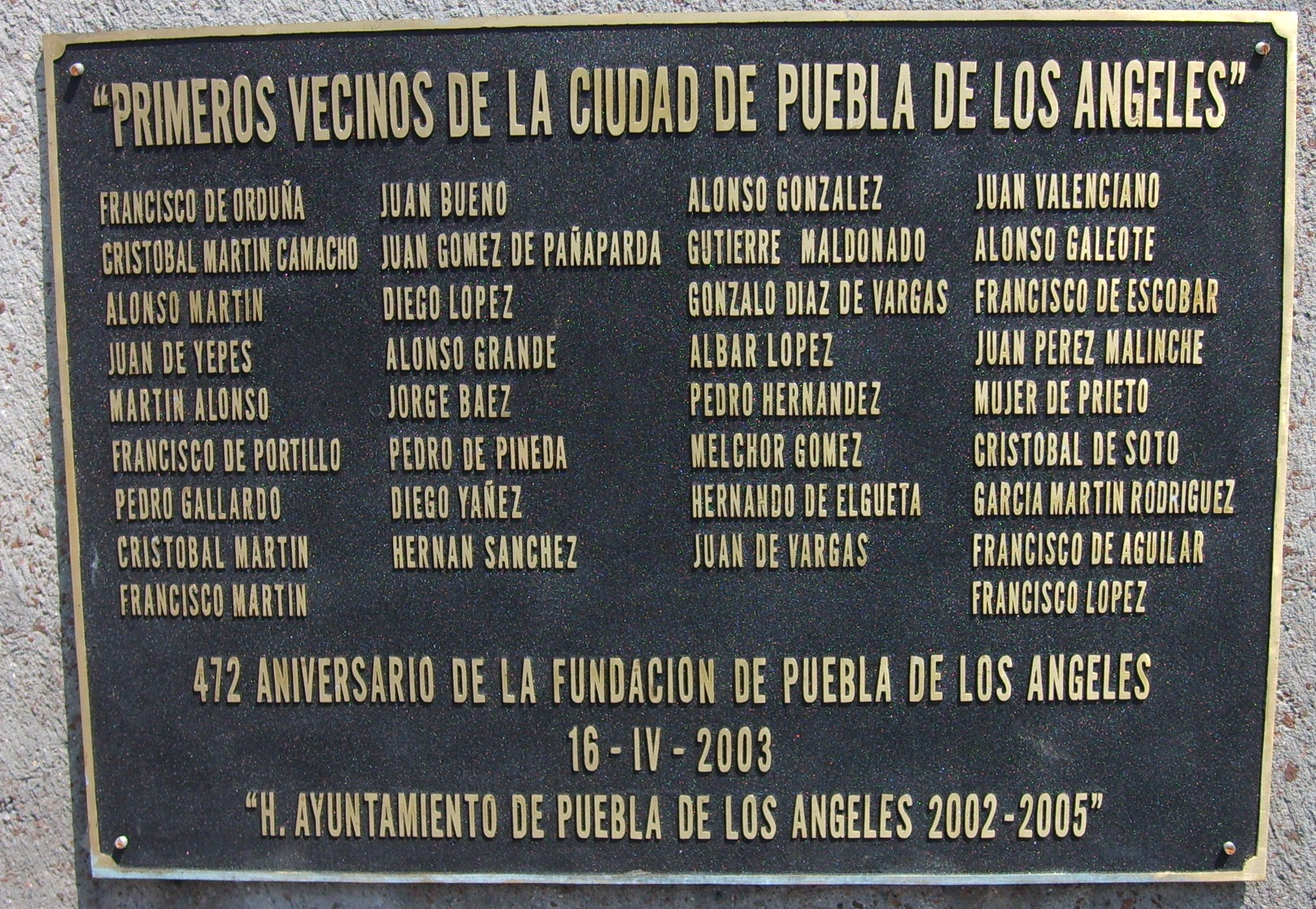 Placa para conmemorar los primeros vecinos de Puebla